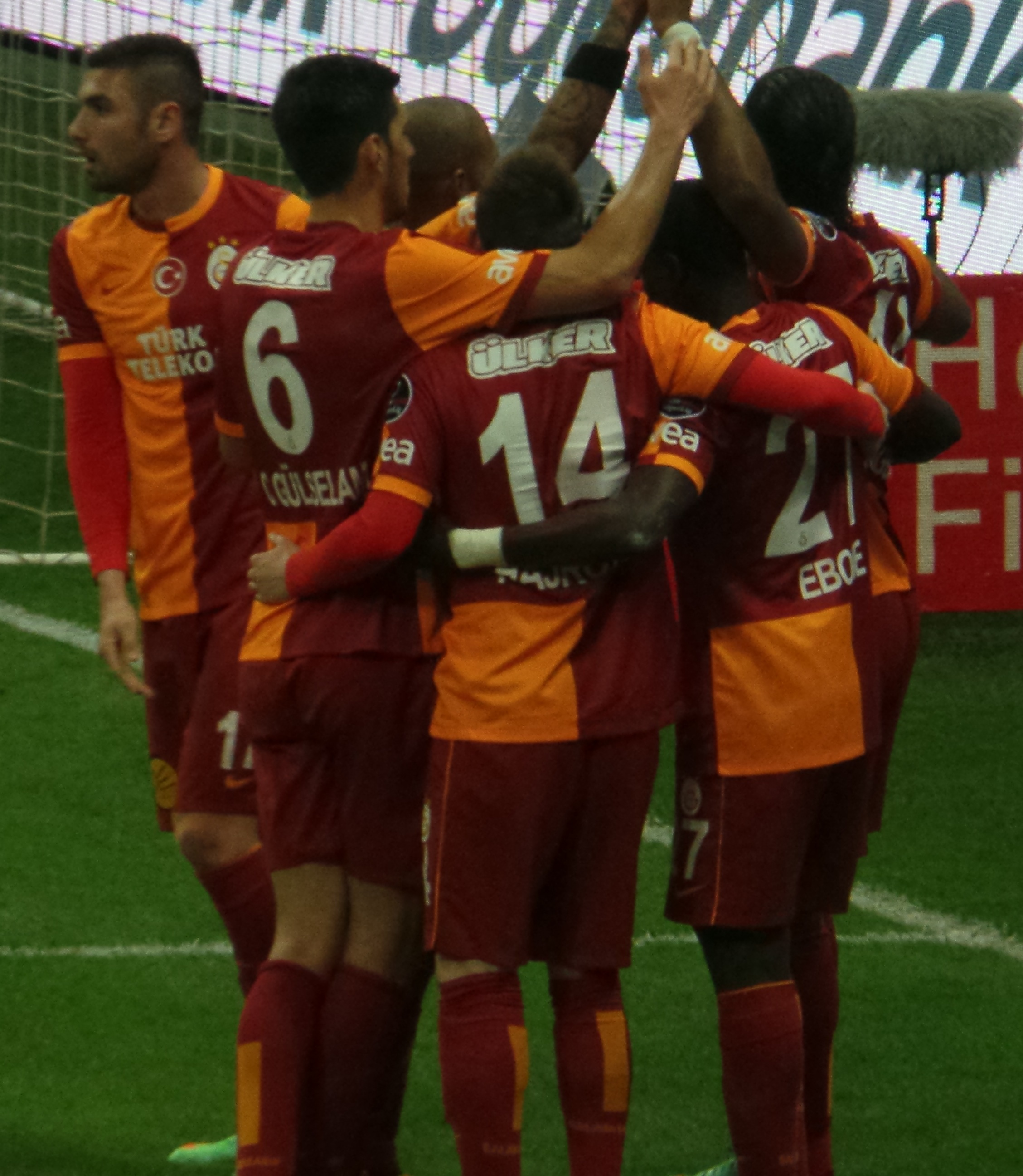 Galatasaray '14